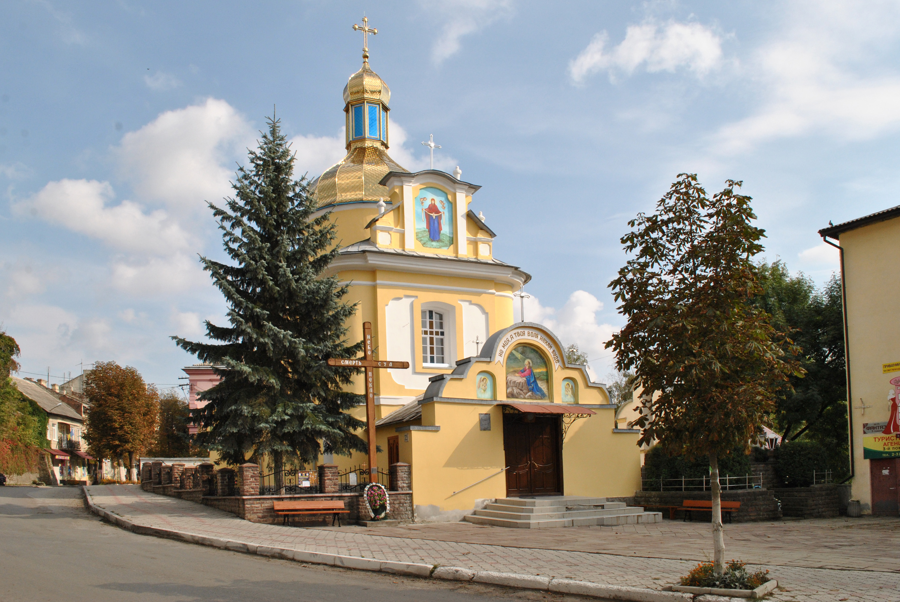 Пам'ятка архітектури національного значення: Покровська церква (мурована) в Бучачі Тернопільської області на вул. Галицькій, 23. Осінь 2014 року.